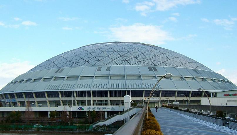 名古屋市東区大幸南に所在するナゴヤドーム。 中日ドラゴンズの本拠地でもあり、様々なイベントが行われる全天候型の施設である。 投稿者 Gnsin 撮影日&場所 2005年2月3日(木) 名古屋市東区のナゴヤドーム大曽根方面デッキにて撮影。 2005年2月4日 (金) 14:13 . . Gnsin . . 807×461 (68,549 バイト) ( GFDL )